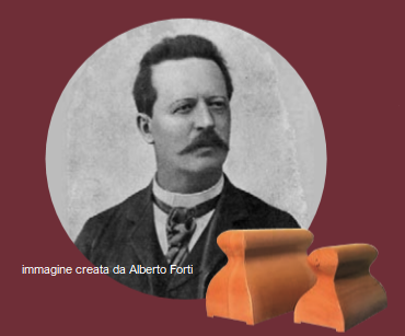 La foto rappresenta il Maestro da giovane, con annessi gli appoggi di sua ideazione